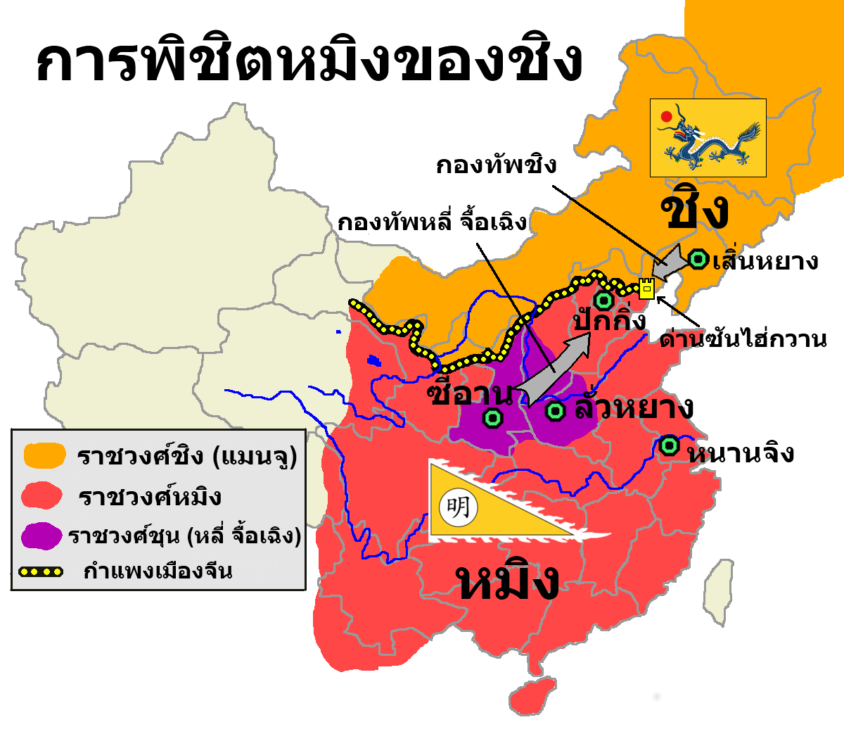 แผนที่แสดงการรุกรานแผ่นดินหมิงของราชวงศ์หมิง